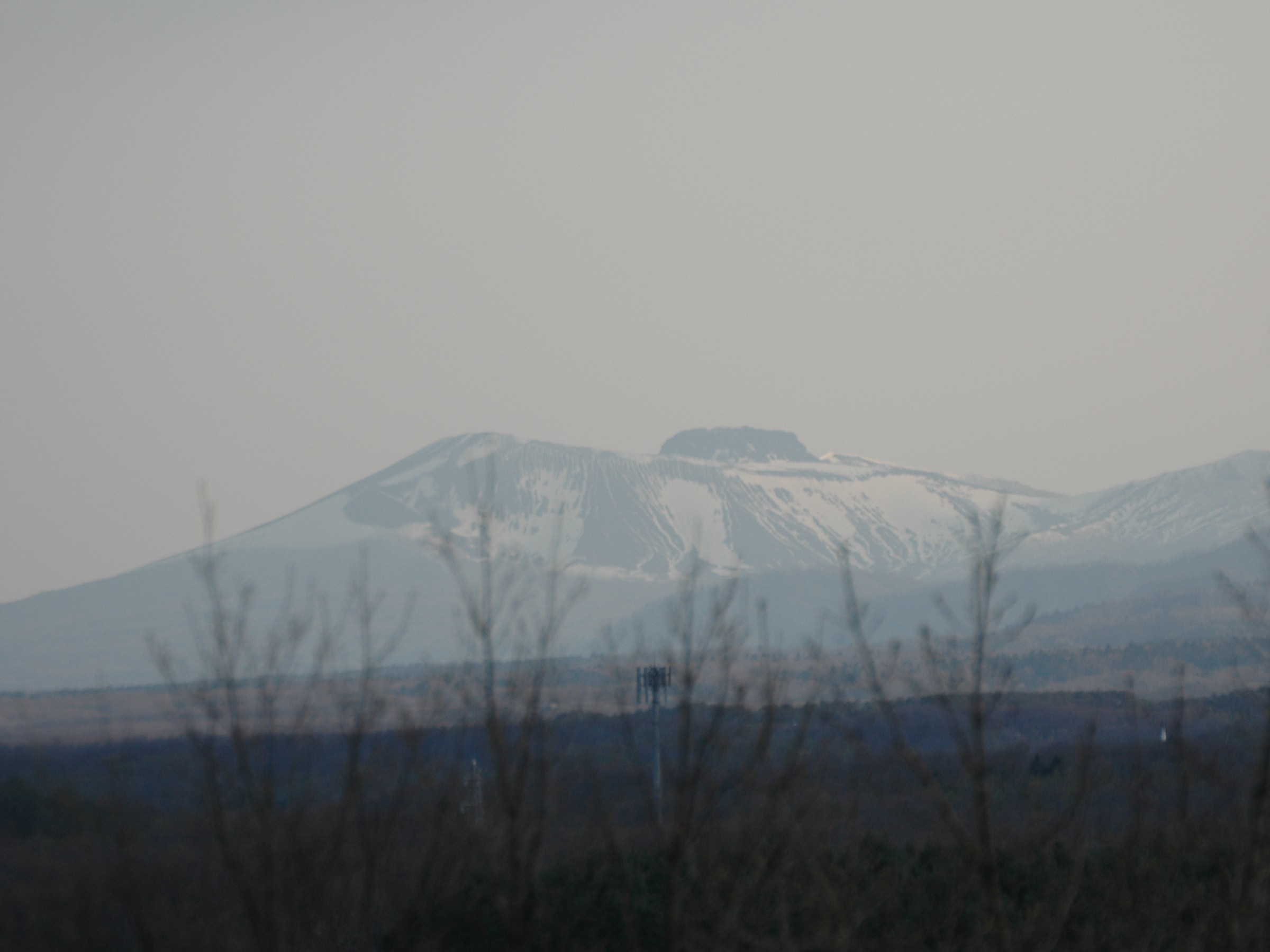 Mt. Tarumae, Hokkaido, Japan